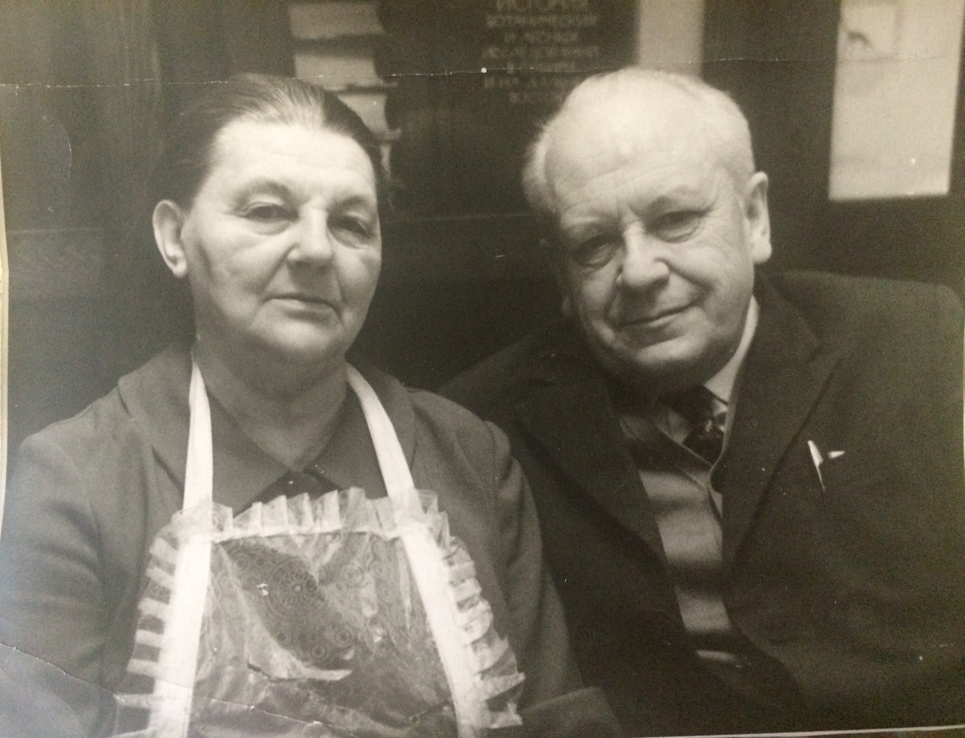 Ал. Ал. Федоров с женой, Натальей Адриановной, в 1976 году